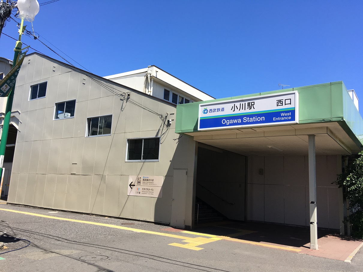 西武鉄道小川駅西口駅舎